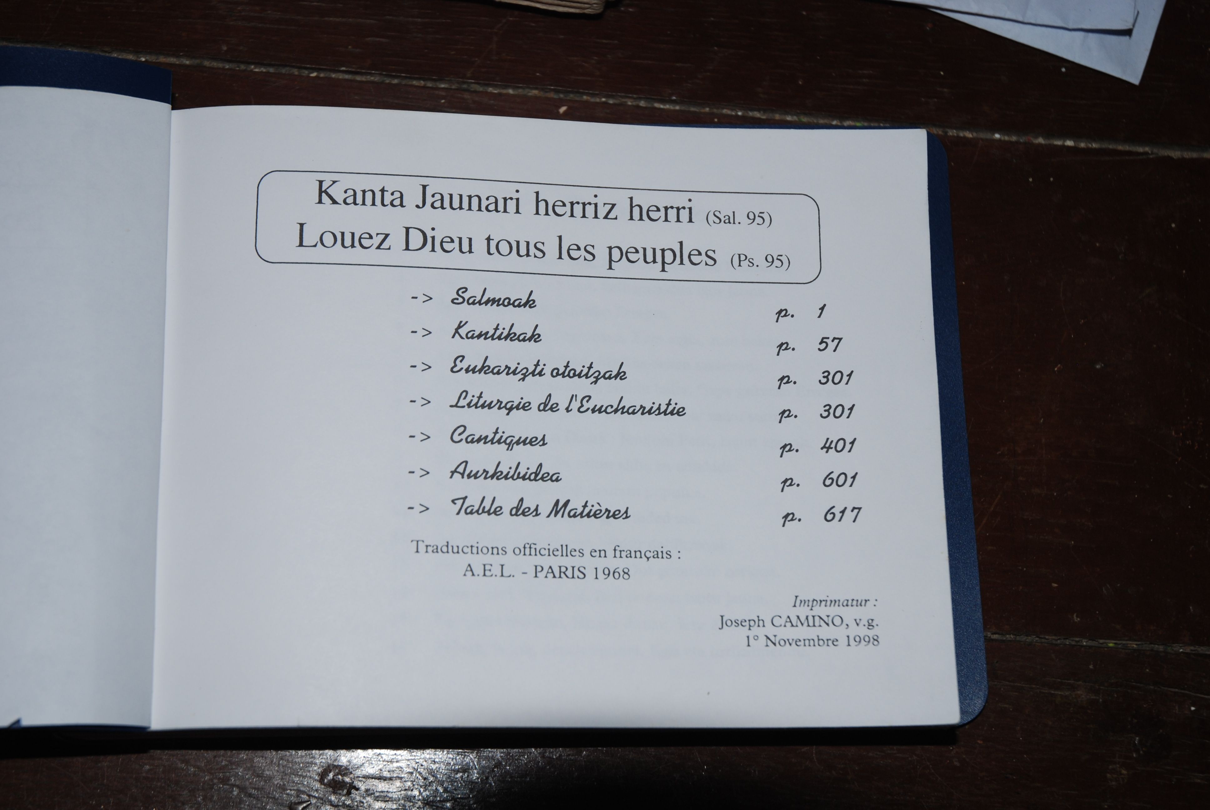 Orègue, livre de messe dans l'église Saint-Jean-Baptiste